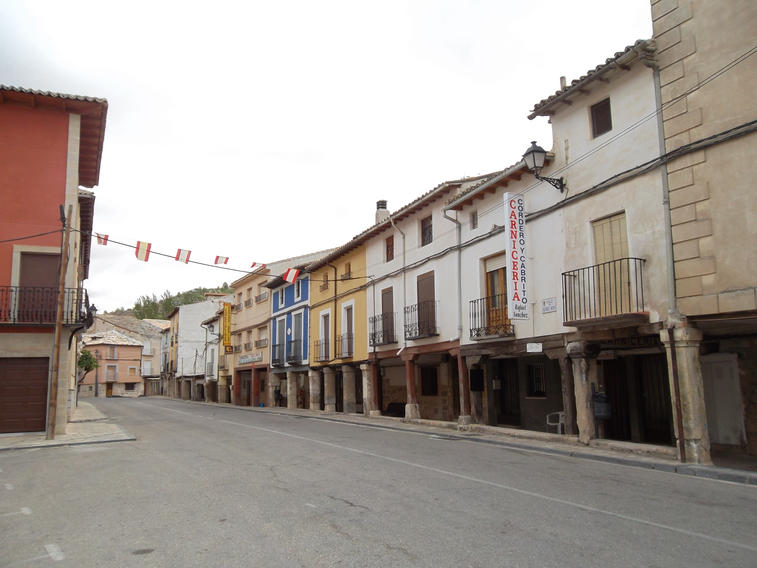 Tendilla-Soportales de la Calle Mayor a lo largo de más de 1000 metros.